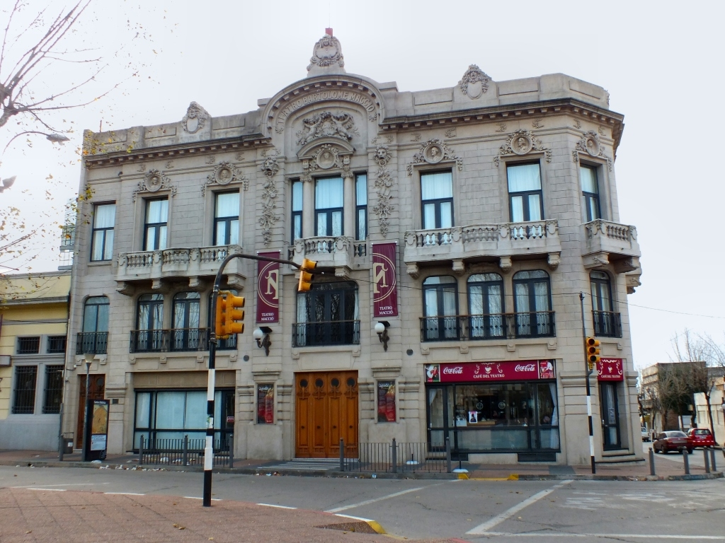 Teatro Macció, plaza central de San José, Uruguay.